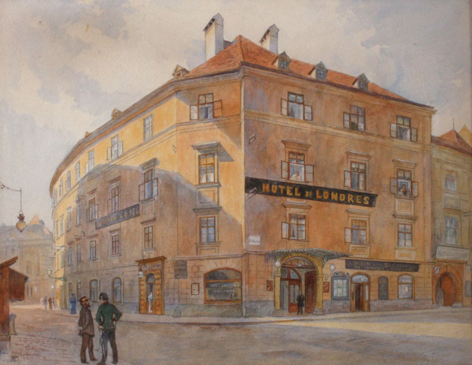 Hotel de Londres, Fleischmarkt, Wien, monogrammiert, datiert "CM 96", Aquarell auf Papier, Bildausschnitt 32 x 41 cm